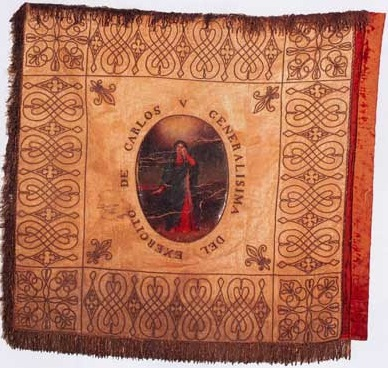 Principal bandera carlista de la primera guerra, conocida como "la Generalísima".